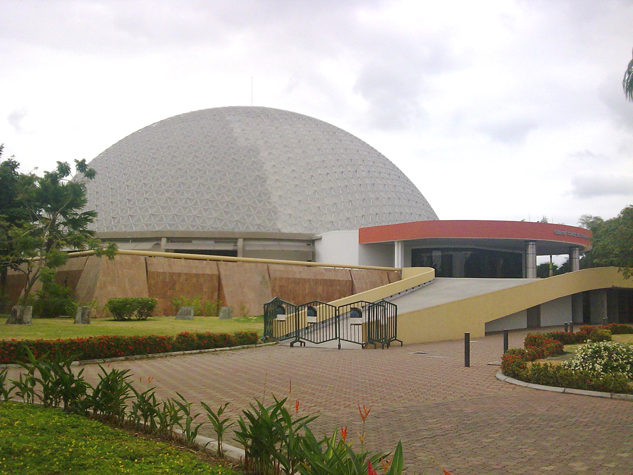 Centro Cívico en el Parque Forestal.